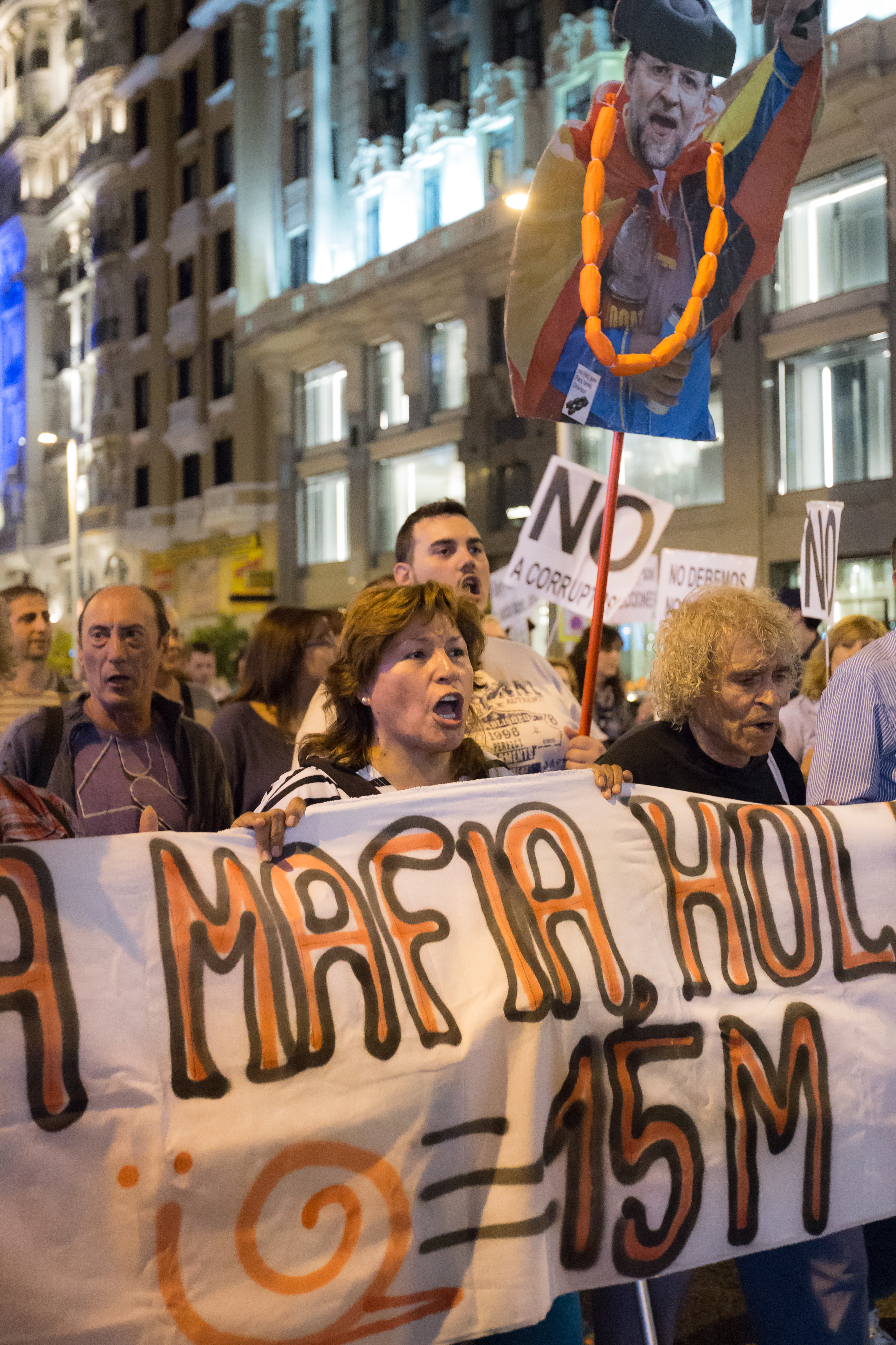 Manifestación "Fuera mafia, hola democracia", Gran Vía, Madrid.